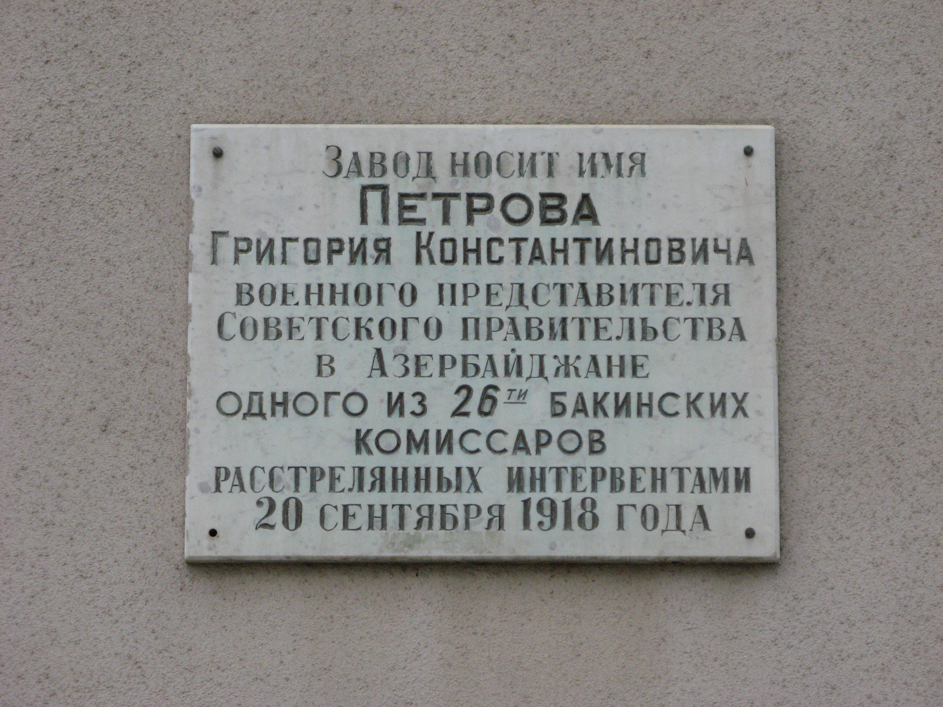 Мемориальная доска на заводе Петрова в Волгограде, названного в честь Петрова Григория Константиновича